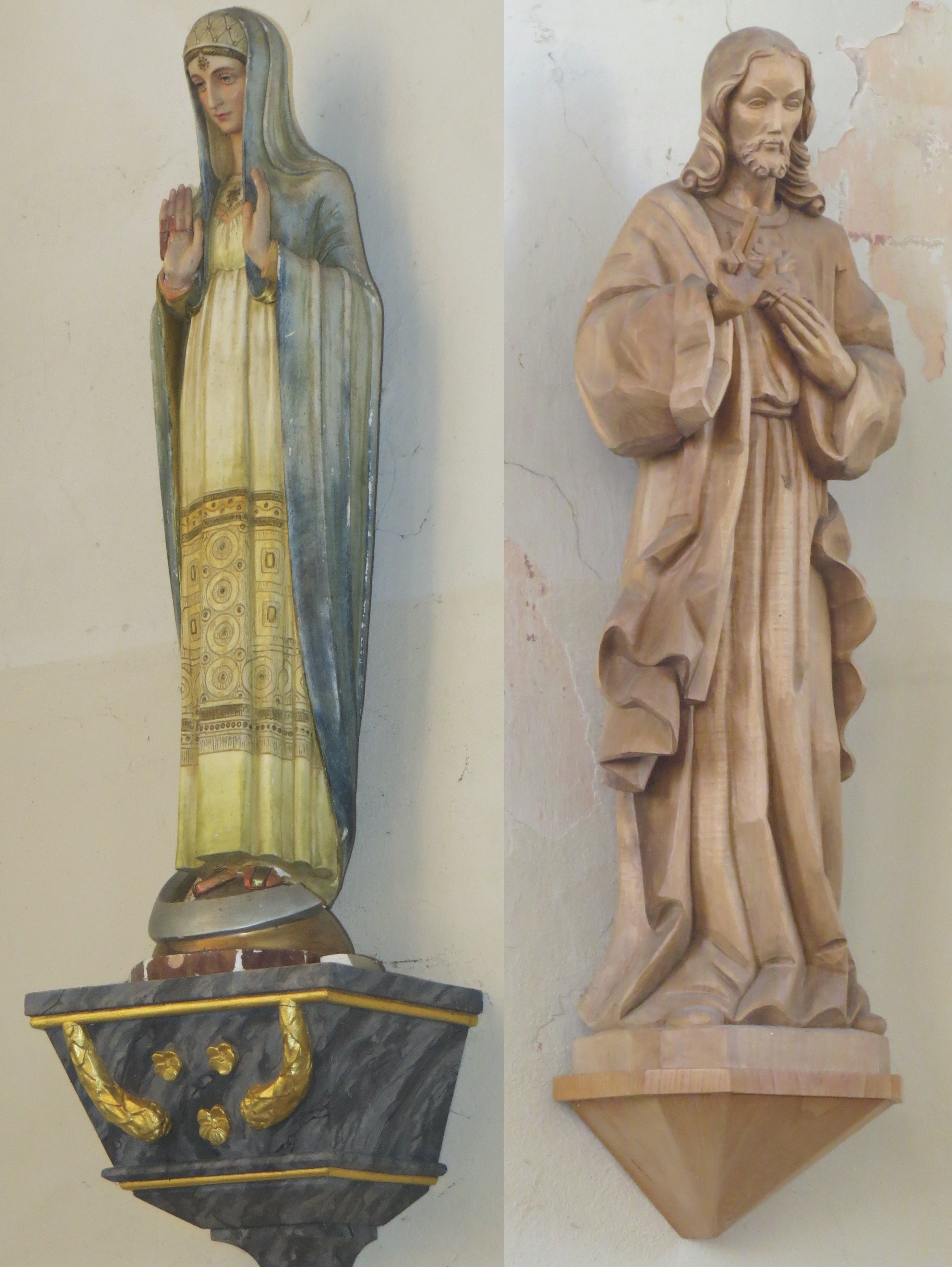 Fotomontage zweier Skulpturen aus dem Kircheninnenraum der Filialkirche St. Markus Minkelfeld, Ortsteil von Kerben, Deutschland. Sie zeigt links die Heilige Maria und rechts Herz-Jesu.